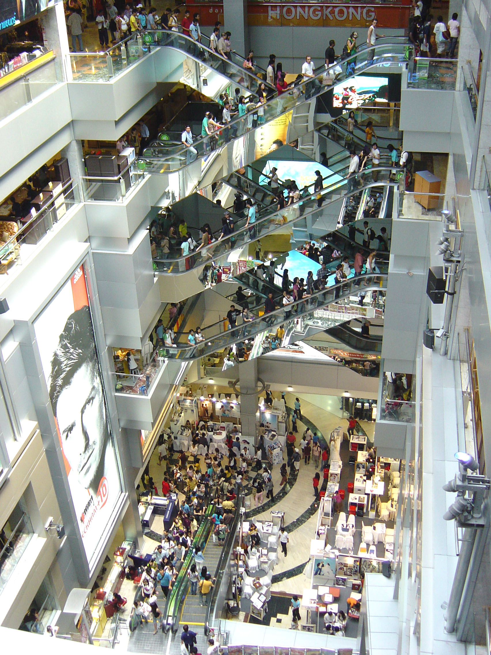 Inside view MBK (Maboonkrong) Center in Bangkok, Thailand - Innenansicht des MBK (Maboonkrong) Center in Bangkok, Thailand